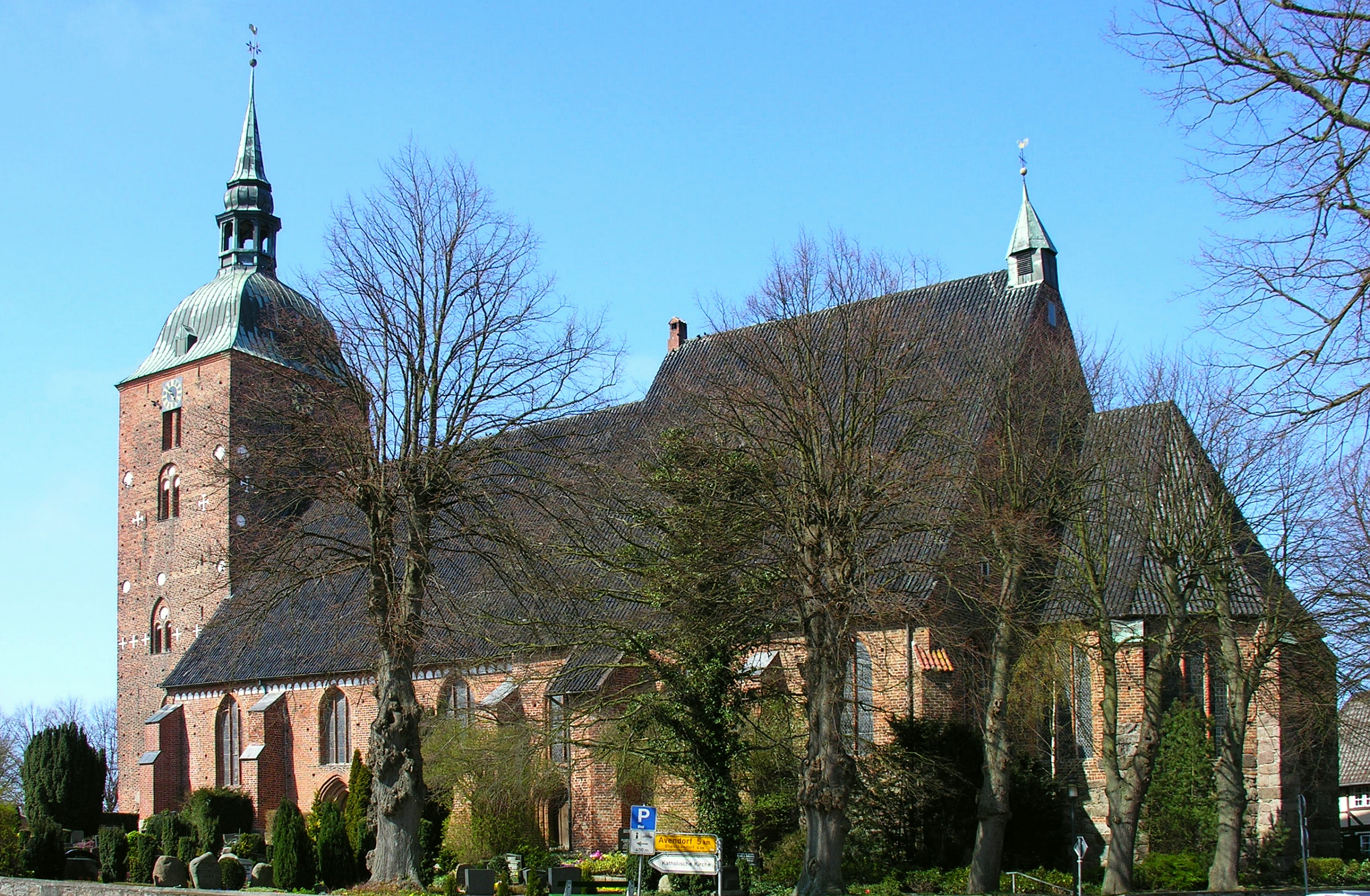 Dreischiffge Hallenkirche St. Nikolai aus dem 13.–15. Jahrhundert in Burg auf Fehmarn - nach Reformation ev.-luth. Kirchengemeinde - Turmhöhe 48 m - Kirchenlänge 61 m (ohne Turm 51 m) - Breite 16 bis 20 m - Foto Wolfgang Pehlemann DSCN0039